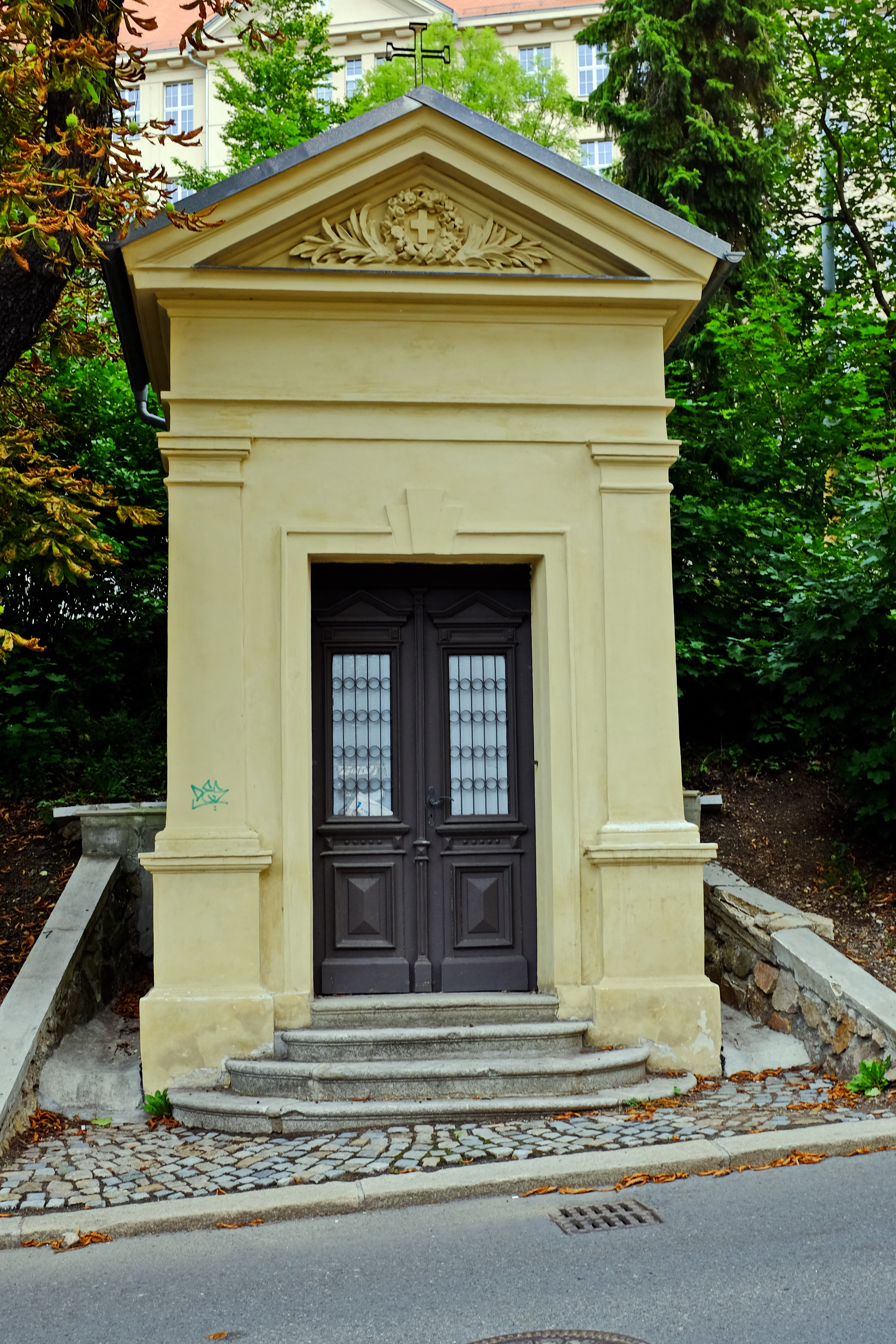 Kaplička svatého Vavřince, mezi ul. Bezručova a nábř. J. Palacha, Karlovy Vary.